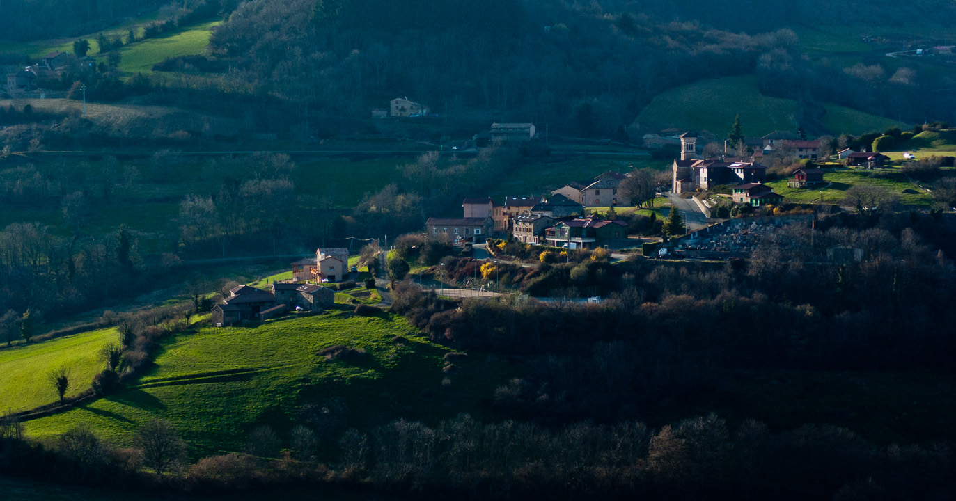 Paysage beaujolais